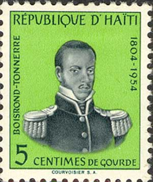 Timbre poste d'Haïti commémorant le 150e anniversaire de la Révolution haïtienne.